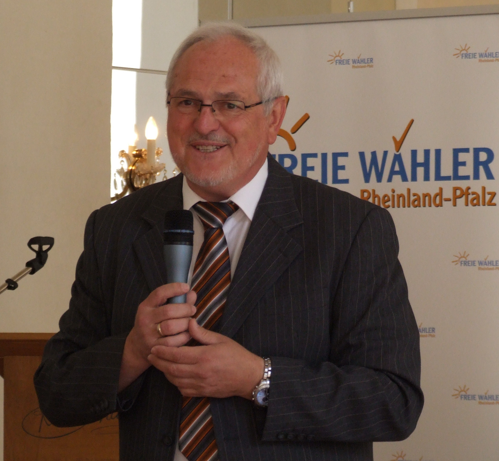 Manfred Petry, stellvertretender Bundesvorsitzender der Freien Wähler und Vorsitzender der Freien Wähler Rheinland-Pfalz und der FWG Rheinland-Pfalz, in Berncastel-Cues, Rheinland-Pfalz